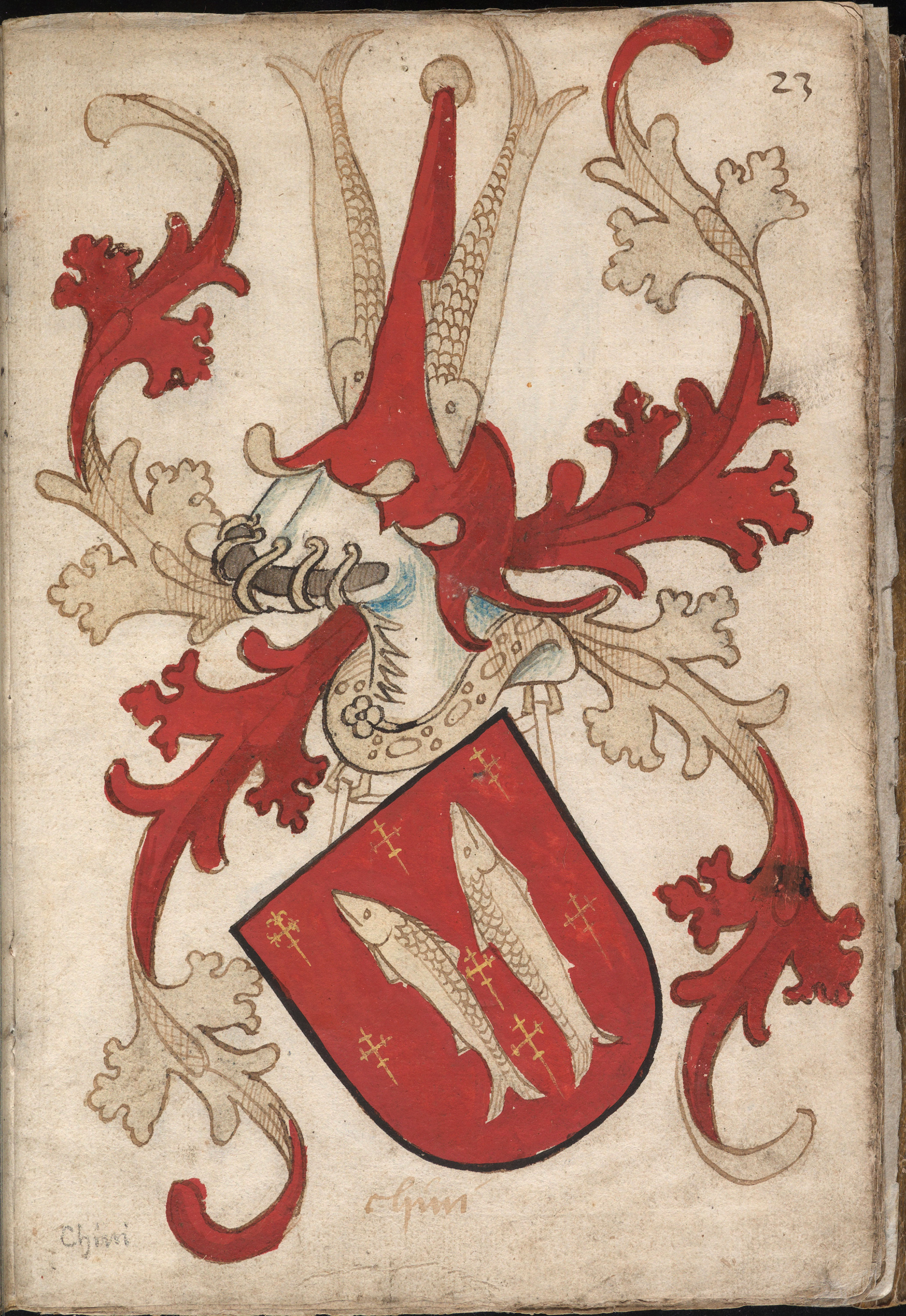 Maria van Loons betovergrootvader Godfried van Heinsberg (1298-1331) was getrouwd met Machteld van Loon-Chiny (ca. 1282-1307). De graven van Loon verwierven het graafschap Chiny - in het huidige Luxemburg en Noord-Frankrijk - door huwelijk in het begin van de dertiende eeuw. In de veertiende eeuw raakten zij het weer kwijt.